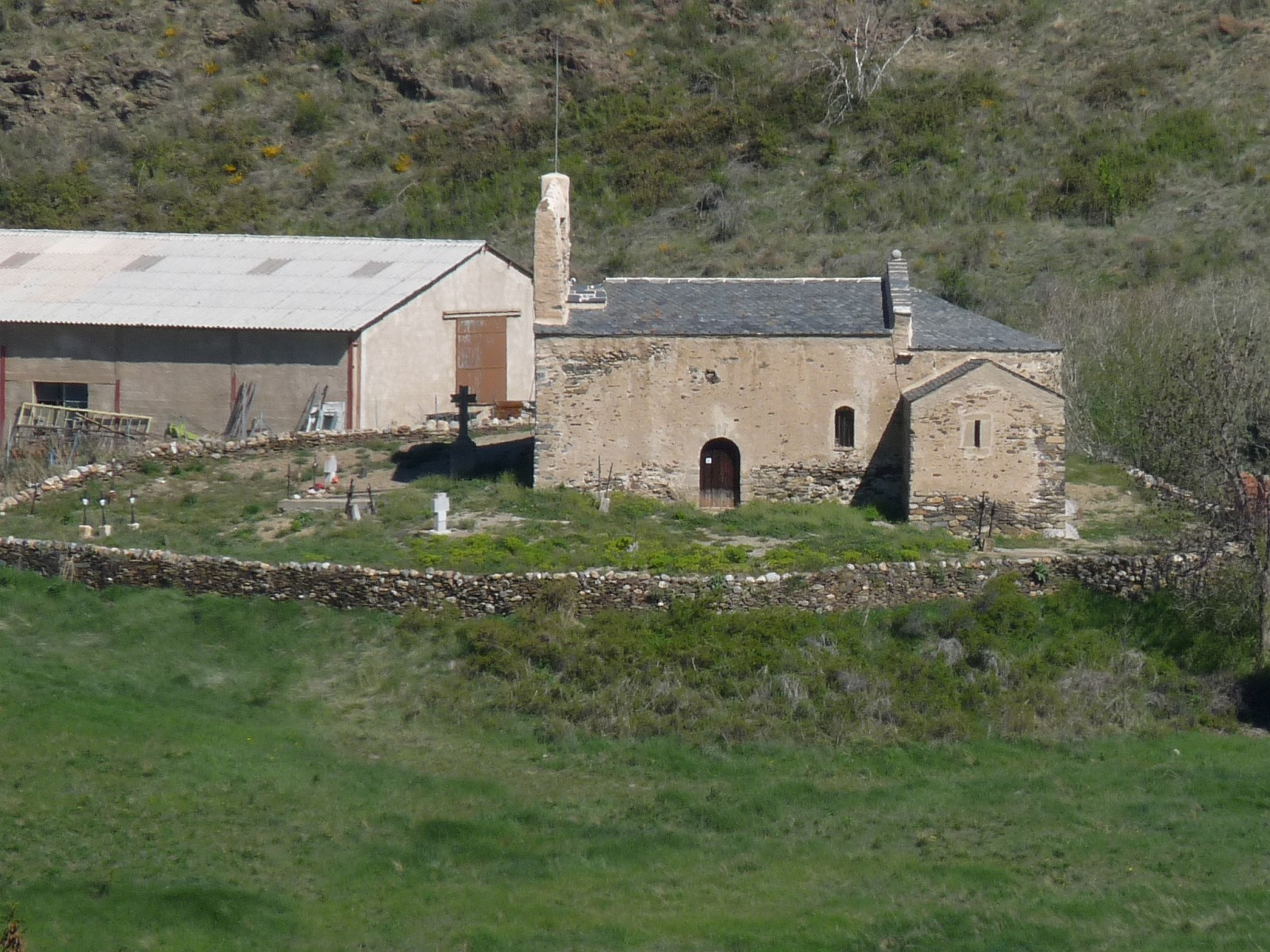 Eglise de Bajande, Estavar, Pyrénées-Orientales, France